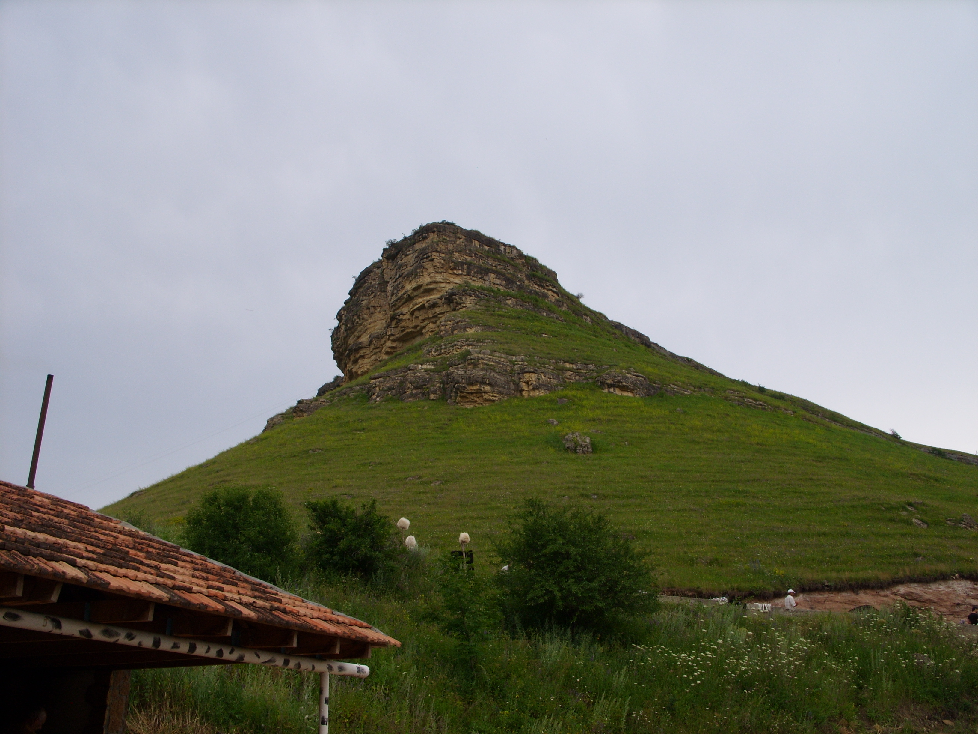 Гора рядом с Медовыми водопадами. Малокарачаевский район Карачаево-Черкесии. Снимки июля 2009 г. Экскурсия из Железноводска